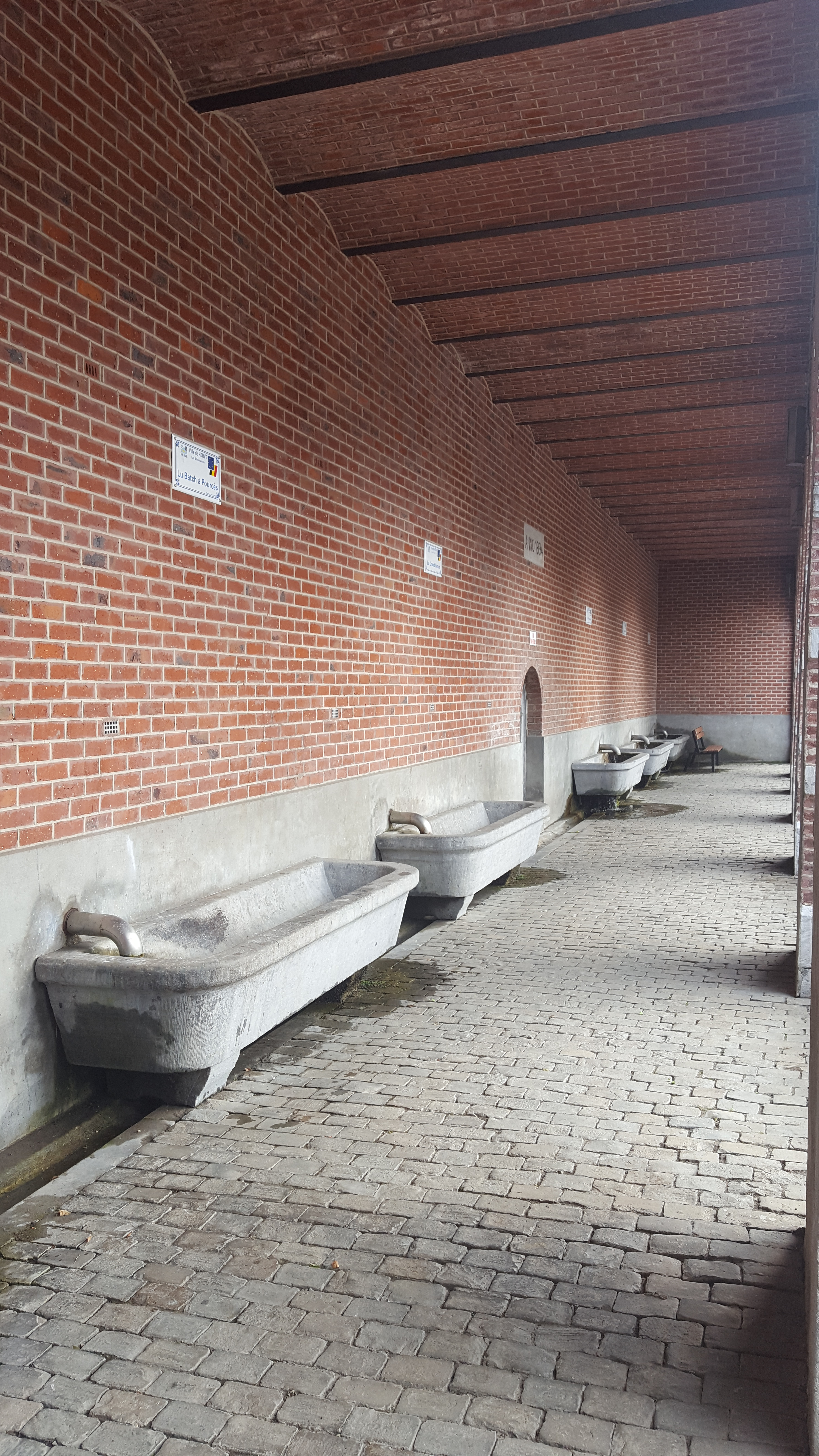 Les Six Fontaines, Herve, Belgique